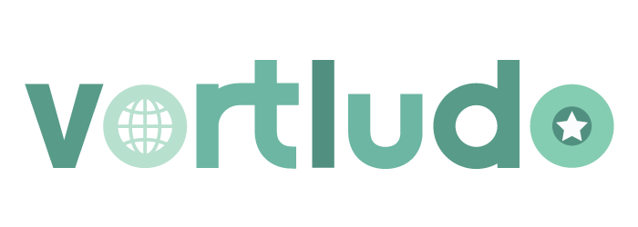 emblemo de vortludo